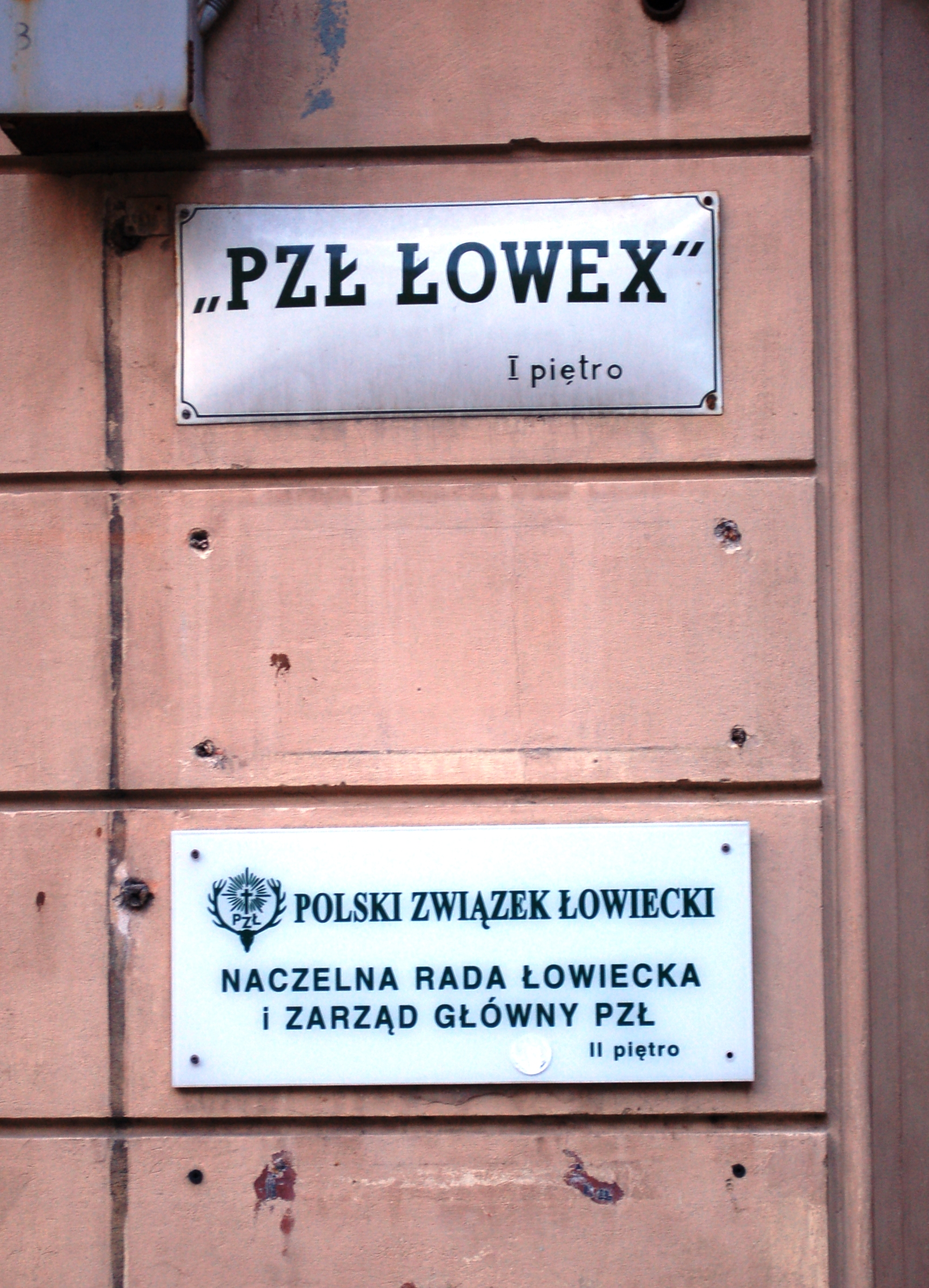 Warschau, Nowy Świat 35, PZŁ Łowex Sp. z o.o. Biuro Polowań, Polski Związek Łowiecki